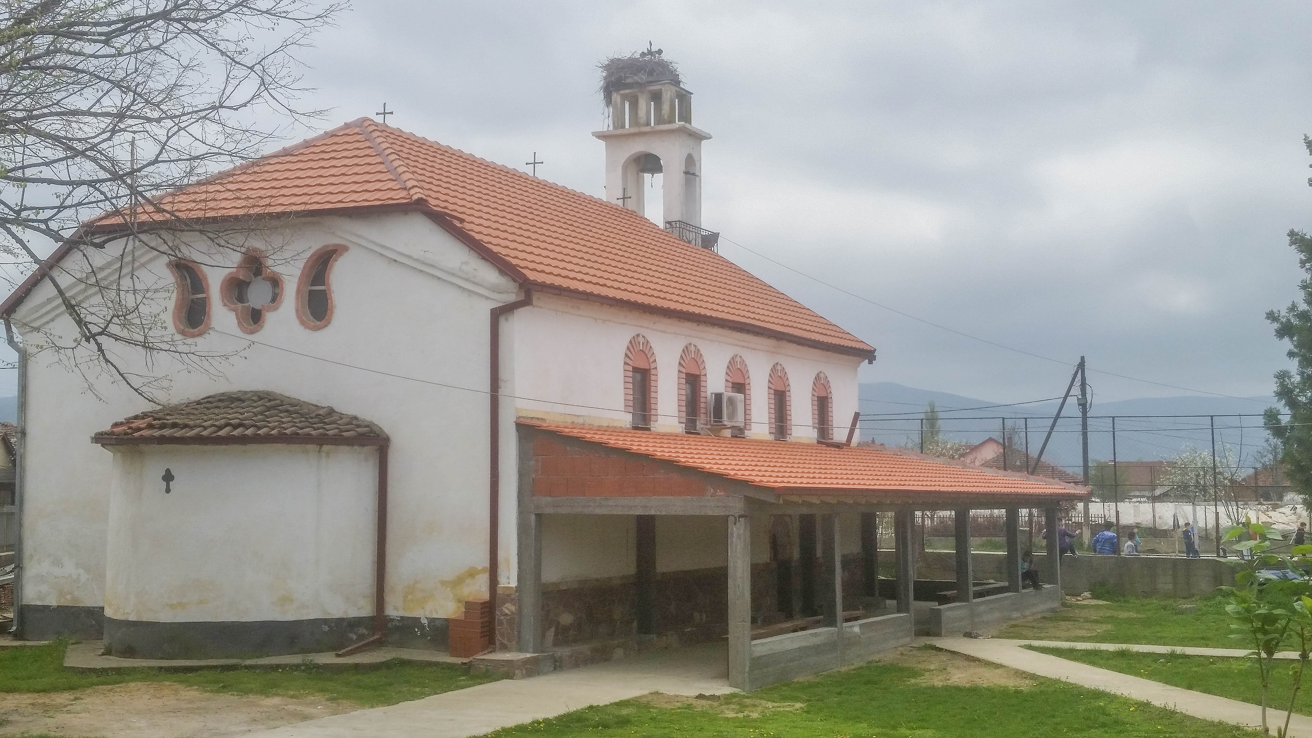 Црква